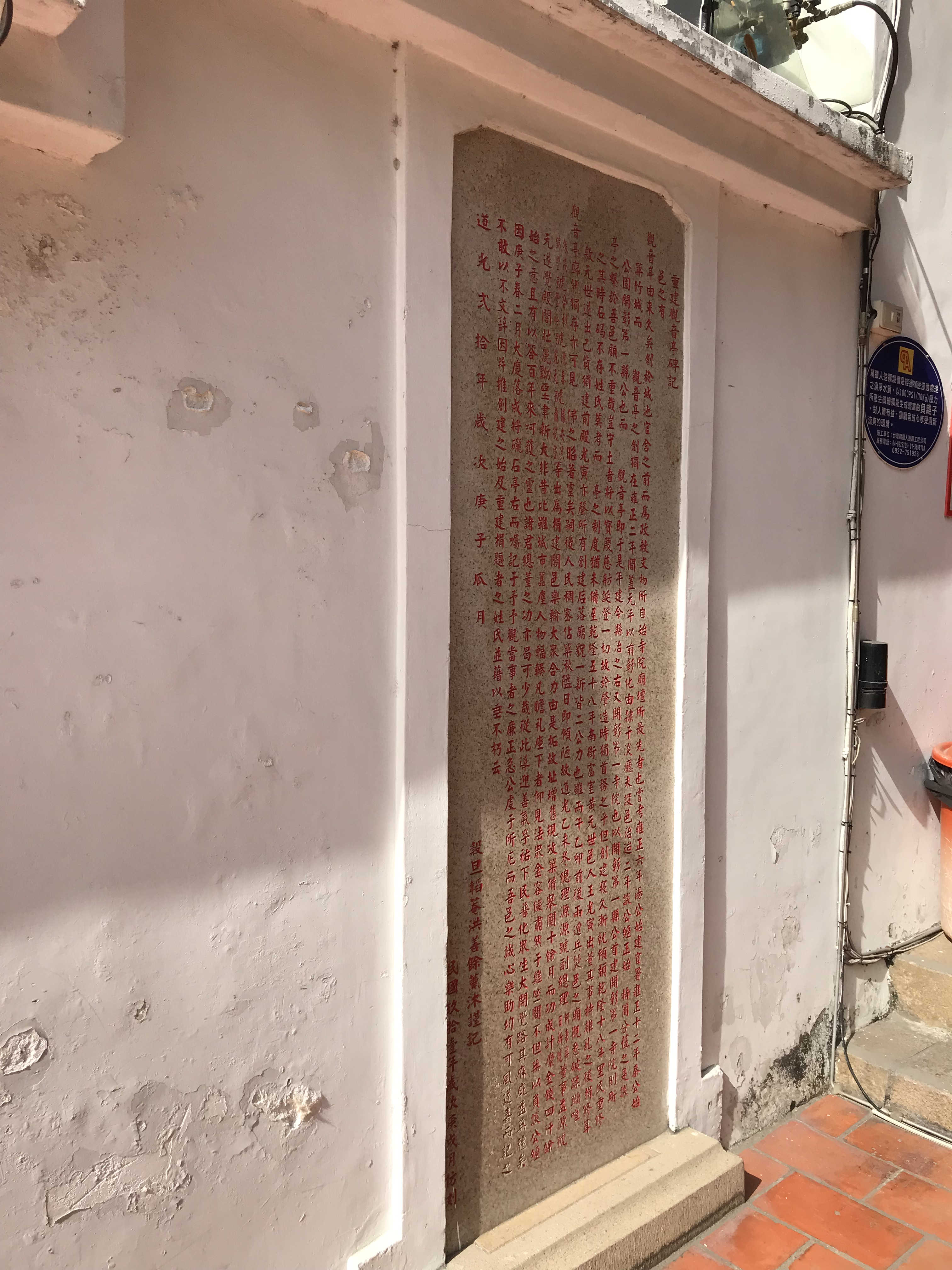 開化寺重修觀音亭碑記